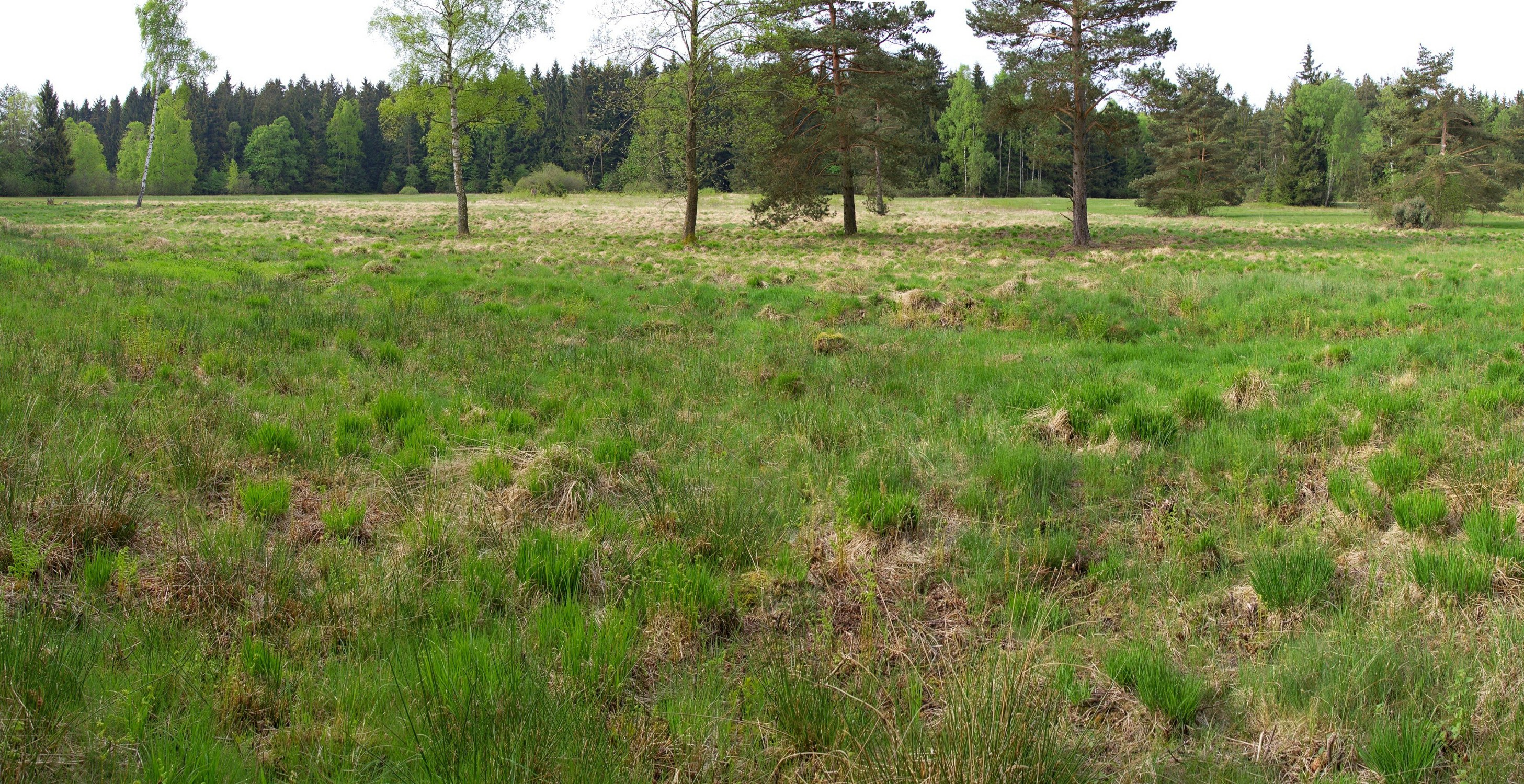 Brandmoos bei Wiesenfelden im Landkreis Straubing-Bogen. NSG-00137.01 WDPA: 81450